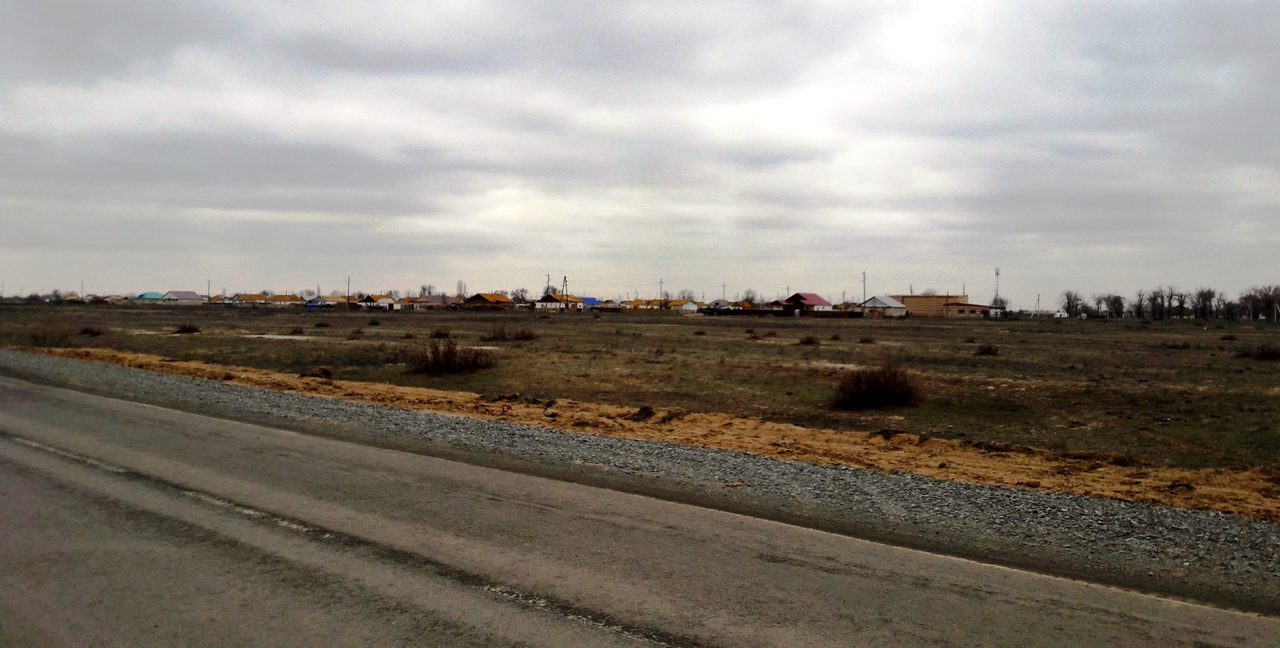 Қазақша (кирил): с.Кудряшов